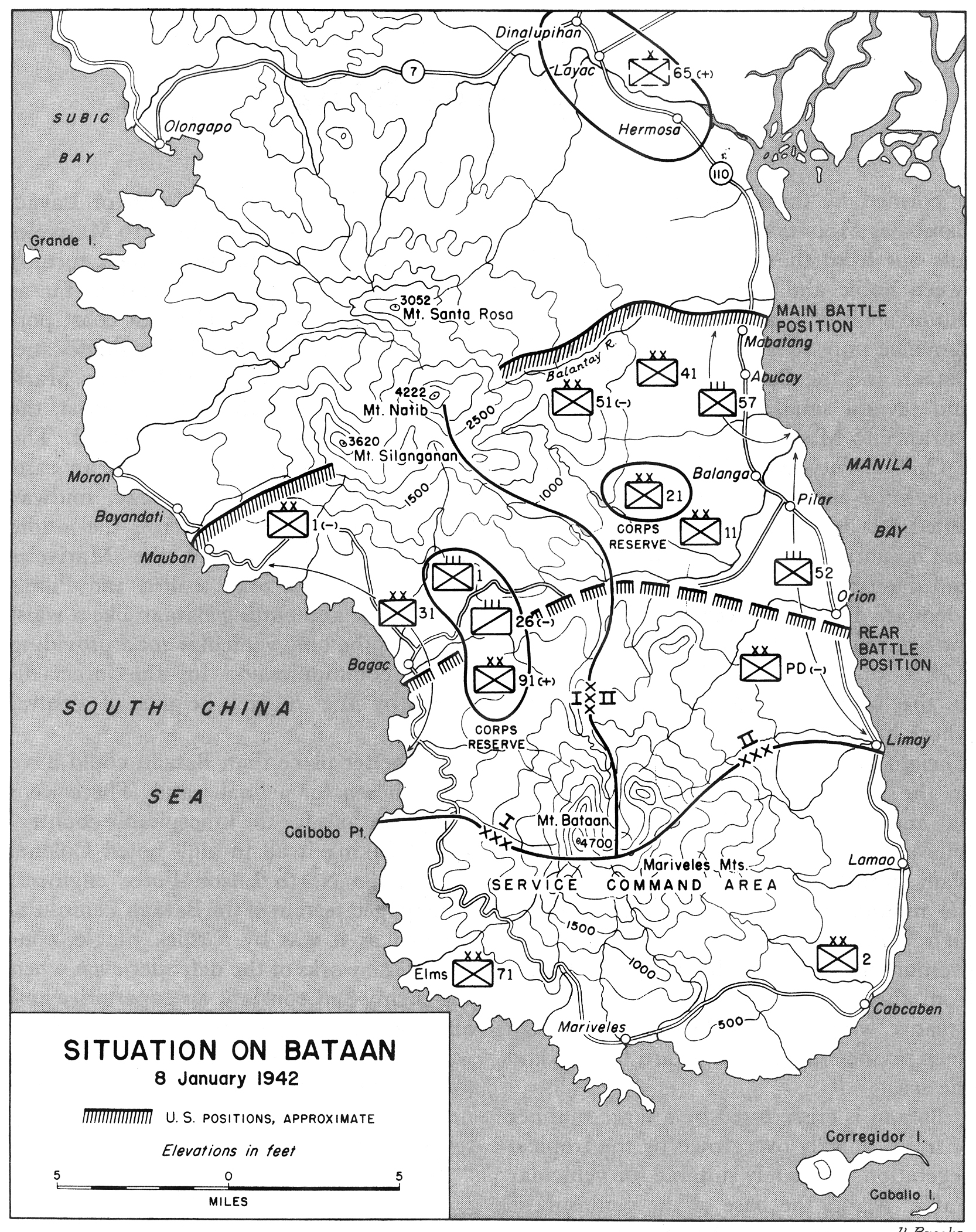 Situation on Bataan, 8 January 1942